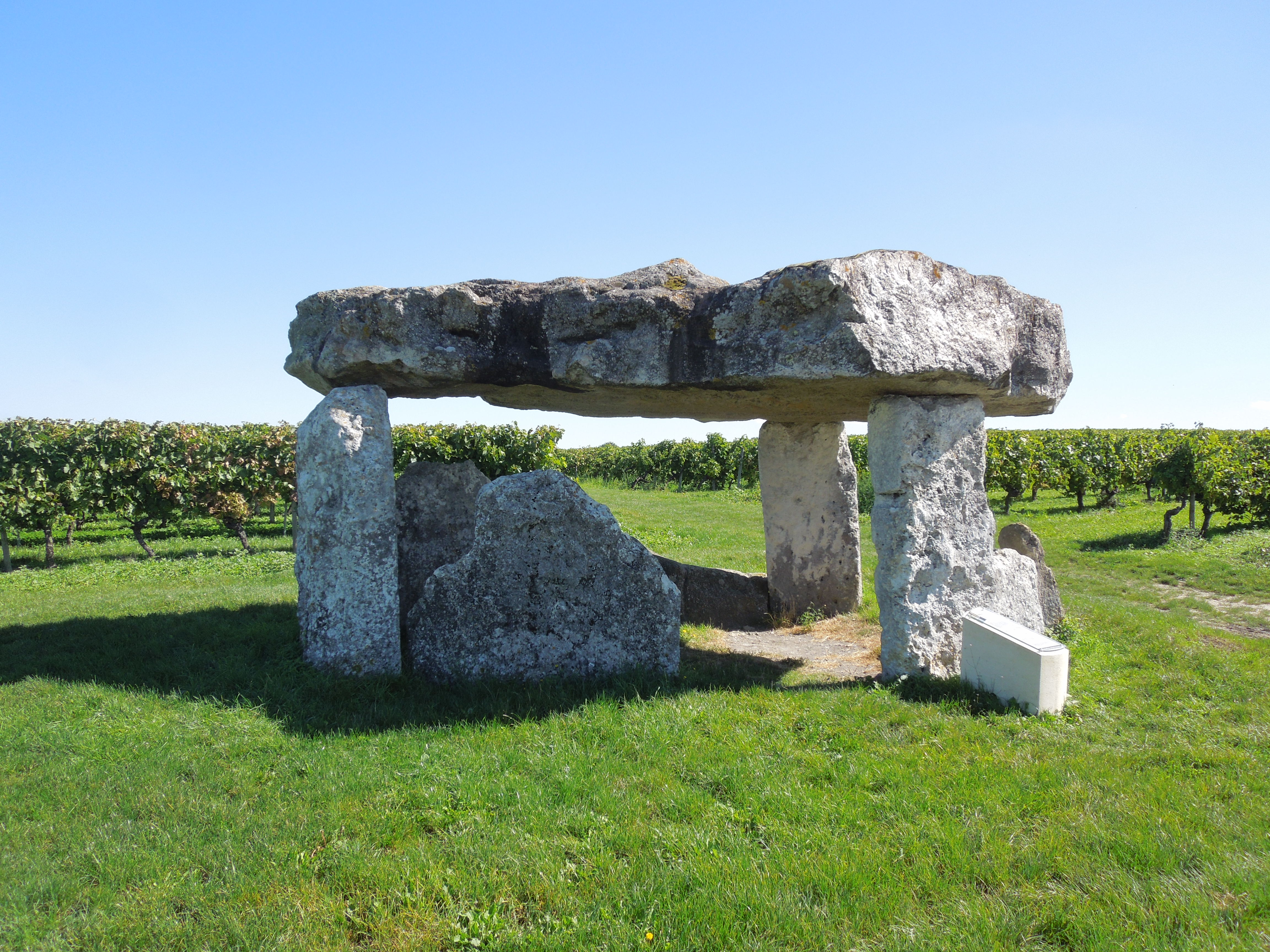 Dolmen bei Saint-Fort-sur-le-Né